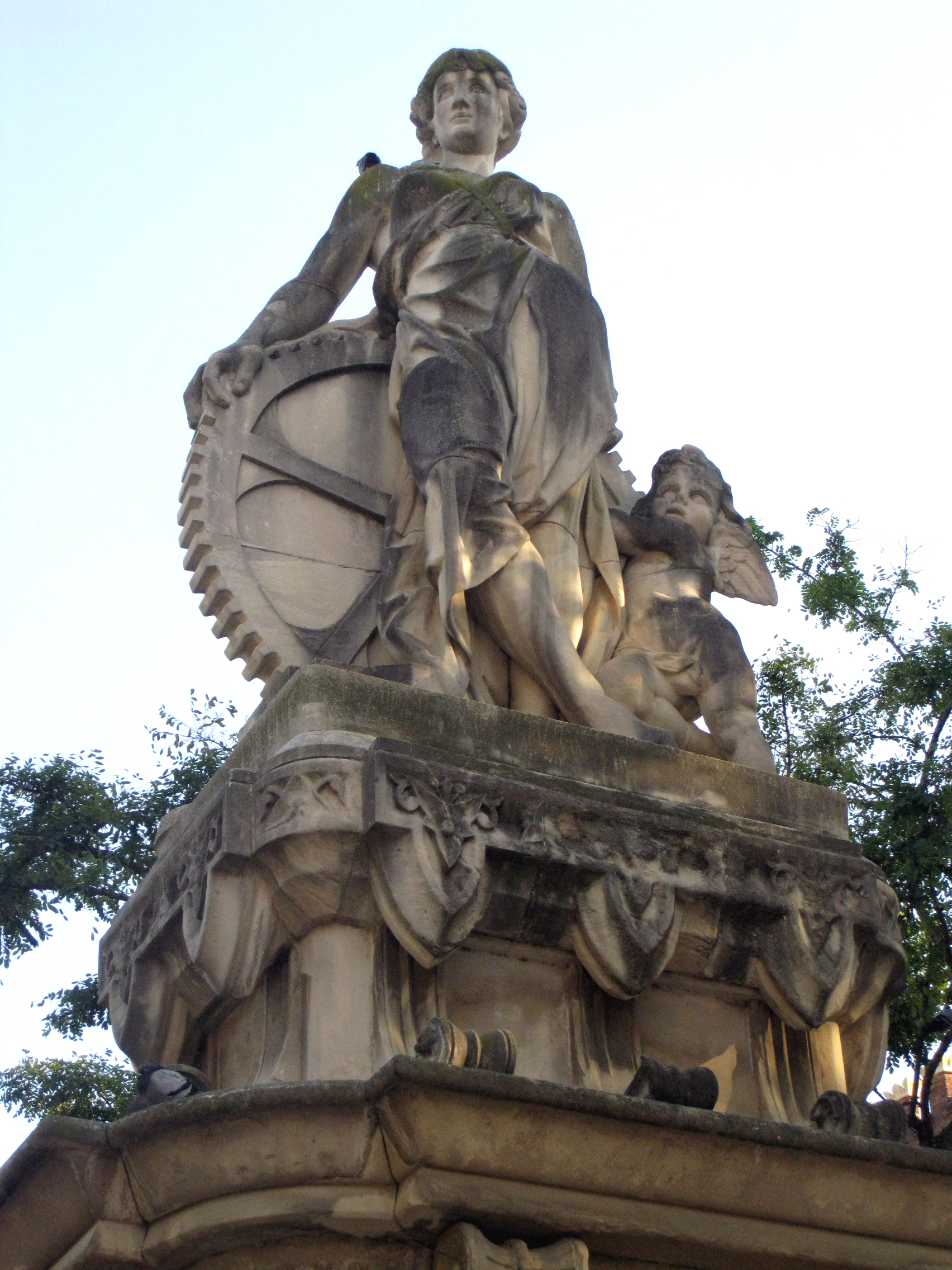 Al·legoria de la Indústria, d'Agapit Vallmitjana, a la porta d'accés al parc de la Ciutadella pel passeig de Vilanova (Barcelona)